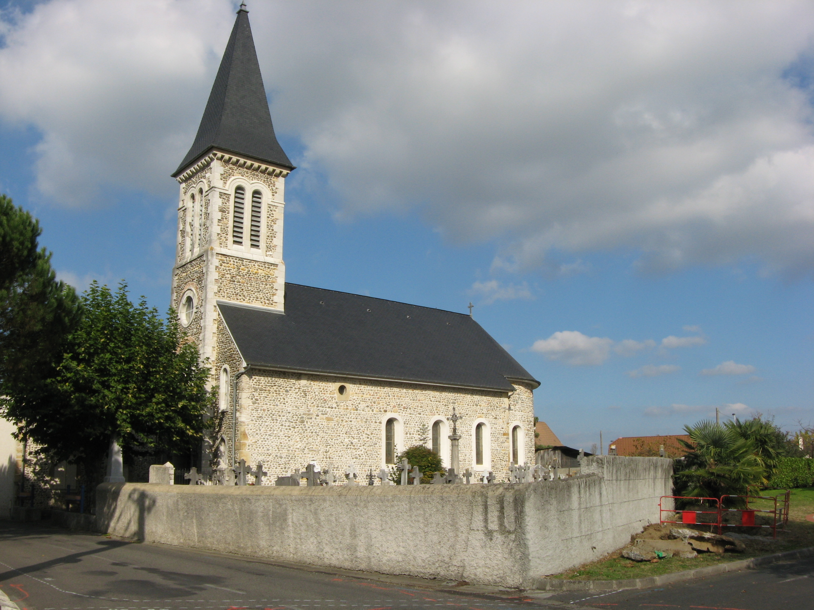 Eglise d'Os Marsillon (Pyrénées Atlantiques) Pyrénées).